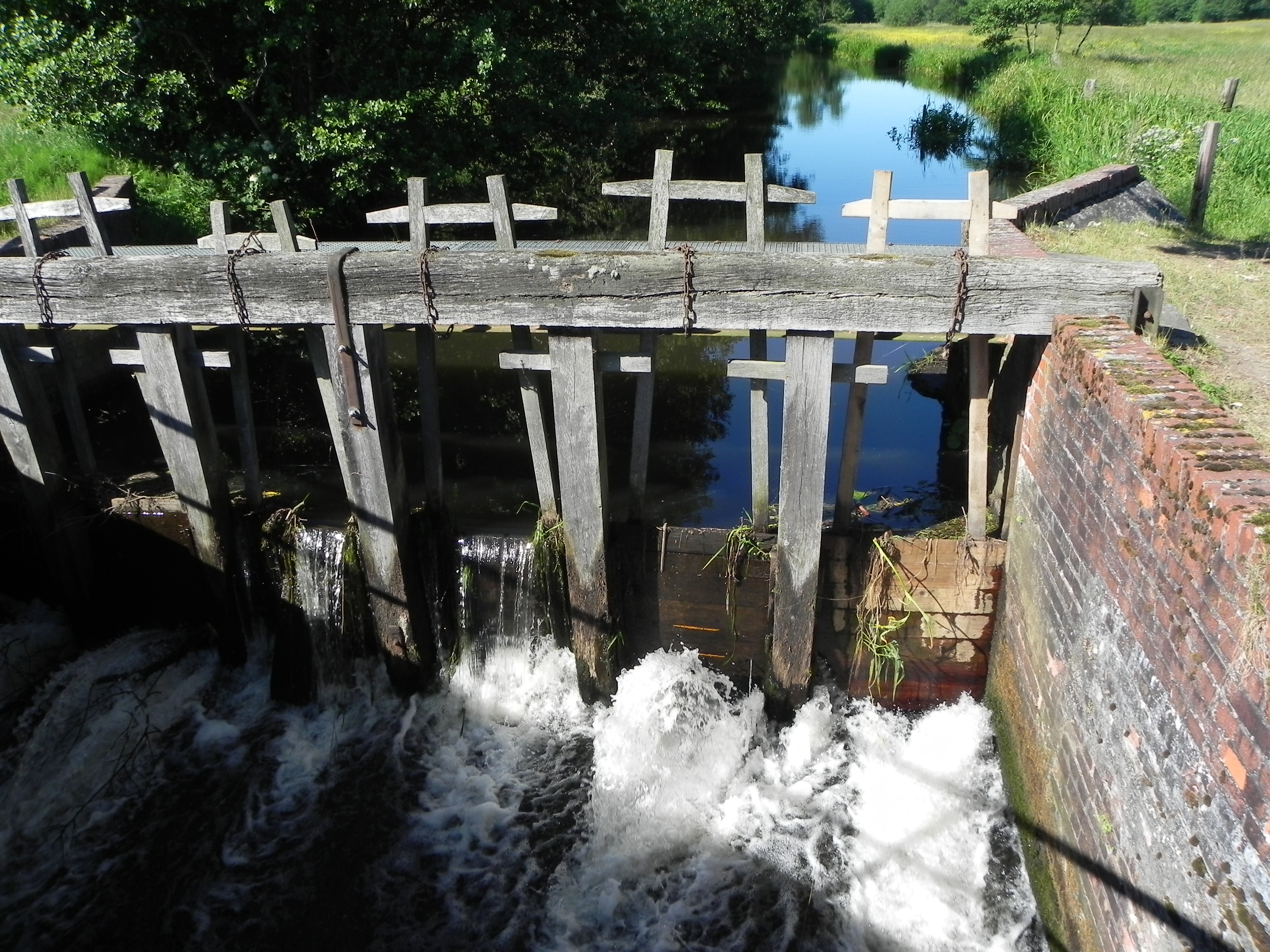 Stauwehr am Örtzekanal bei Wolthausen, Niedersachsen, Germany